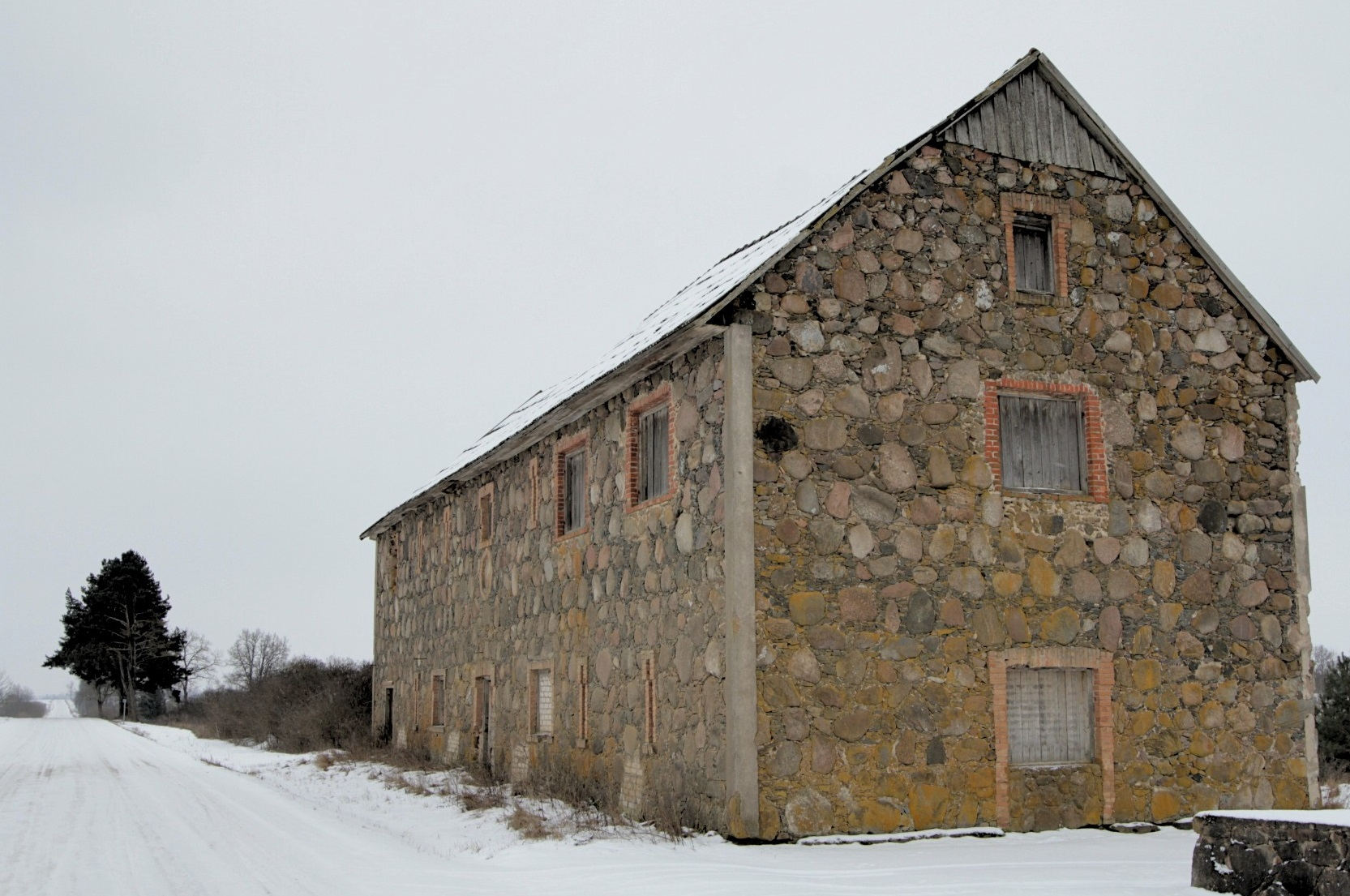 Kubilių magazinas